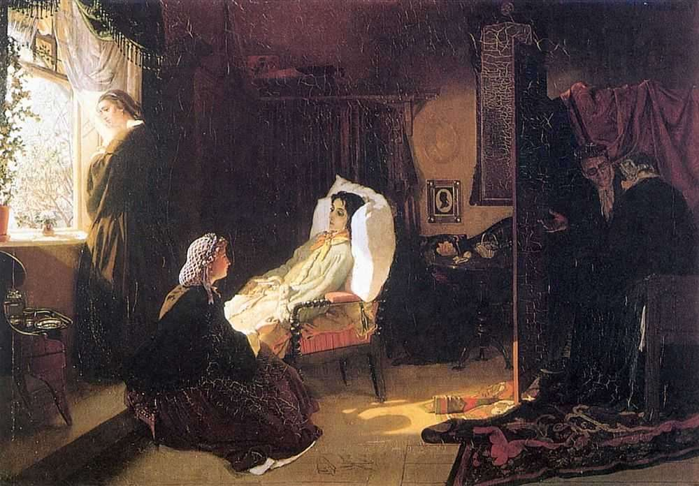 Картина "Последняя весна" - художник - барон Михаил Петрович Клодт (Клодт фон Юргенсбург) (1835—1914), живописец, акварелист, академик Императорской Академии художеств.